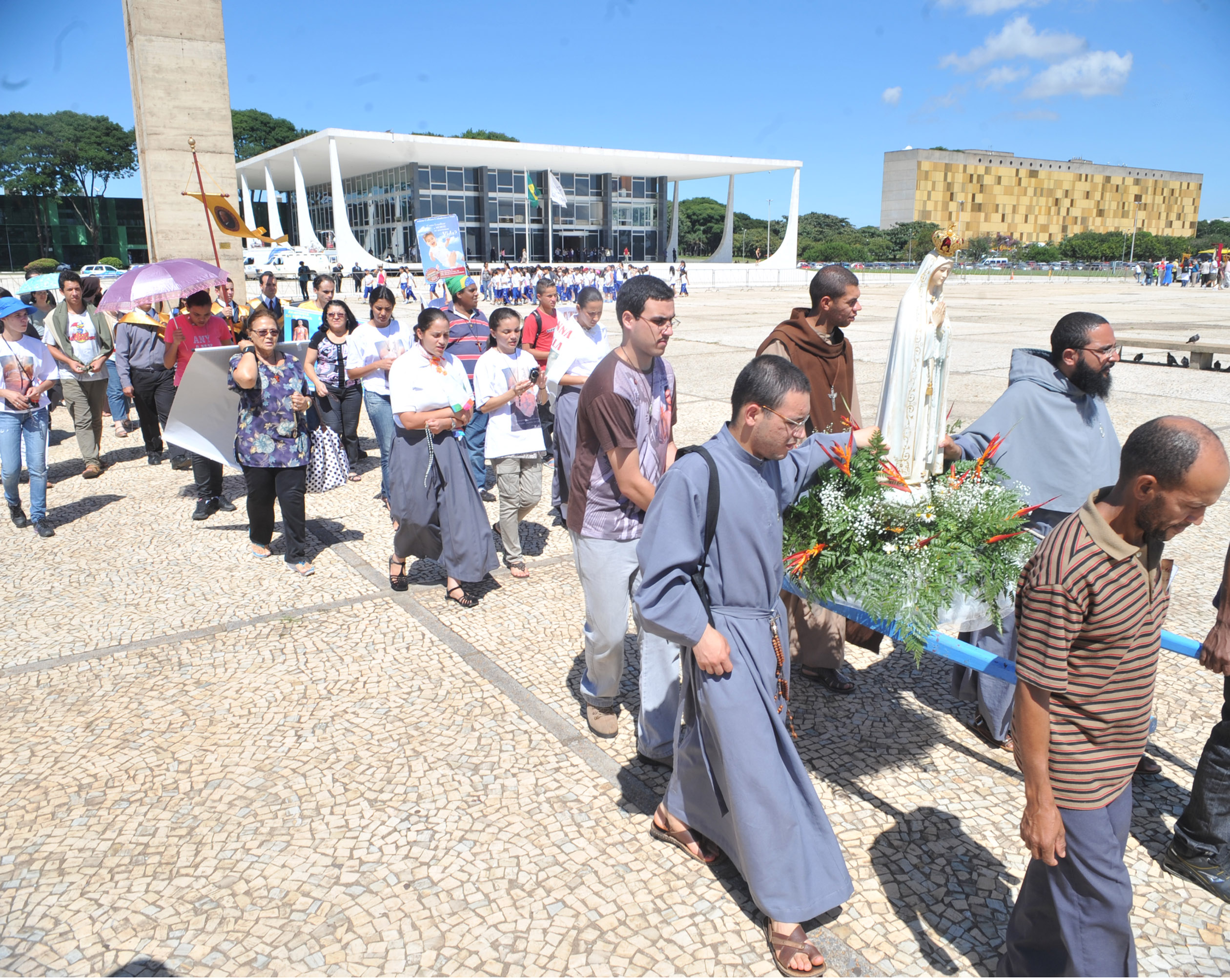 Brasília - Religiosos fazem manifestação em frente ao STF, pedindo que os ministros rejeitem a descriminalização do aborto em caso de feto anencéfalo